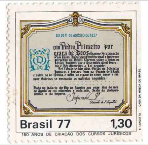 Selo com estampa de réplica da lei Imperial de 11 de agosto de 1827 que cria os cursos de Ciências Jurídicas (atual Direito) me Olinda, atualː Faculdade de Direito do Recife da Universidade Federal de Pernambuco e em São Paulo, a atualː Faculdade de Direito da Universidade de São Paulo.